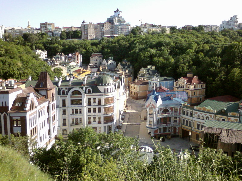 Гончарі-Кожум'яки